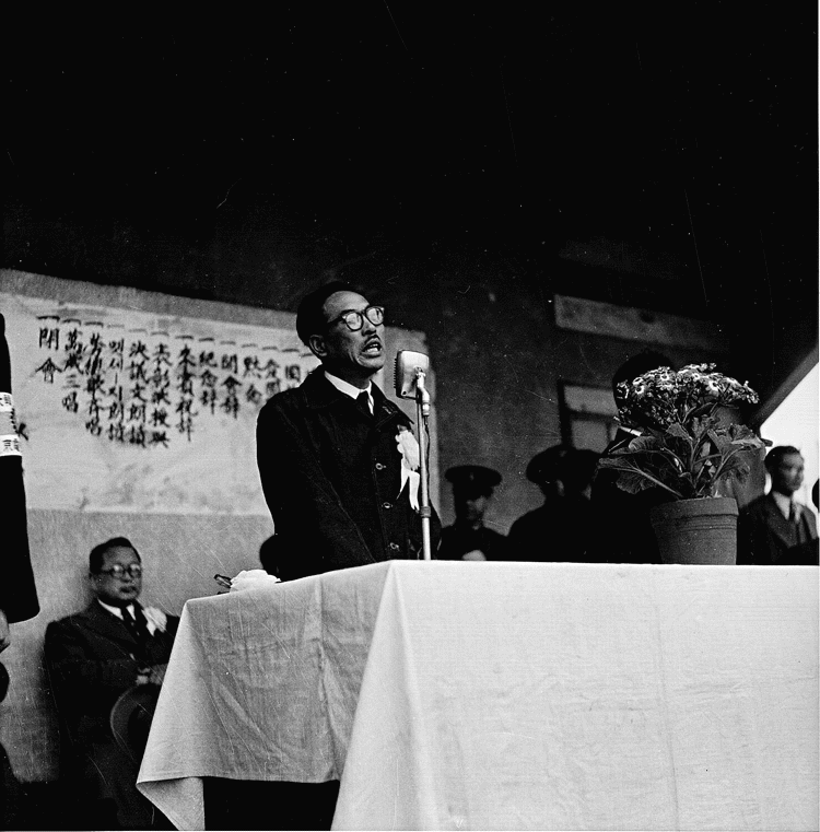 촬영일 : 1954년 05월 01일 촬영장소 : 대한민국 참석자 : 미상 관련내용 : 노동절 기념대회에서 대회사를 낭독하고 있다.